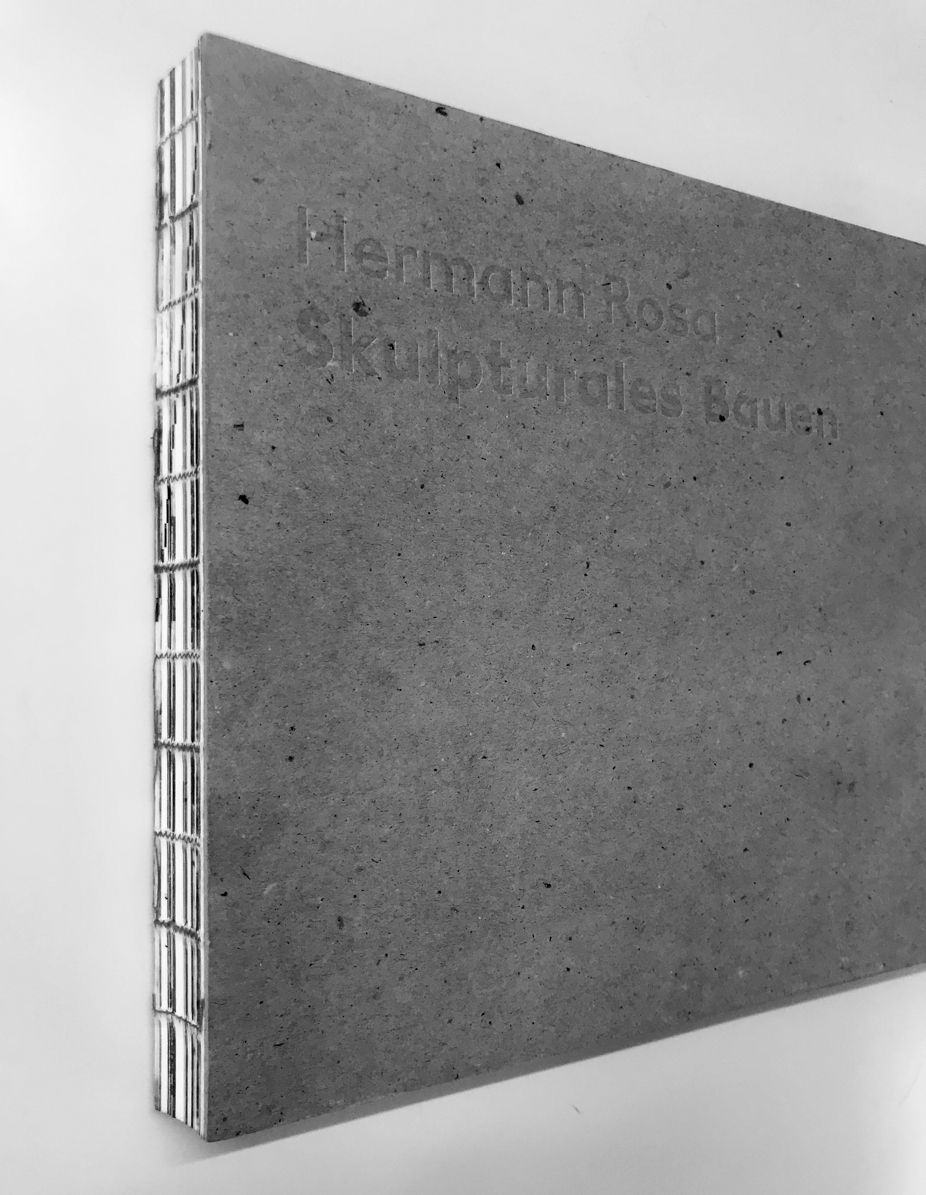 Skulpturrales Bauen